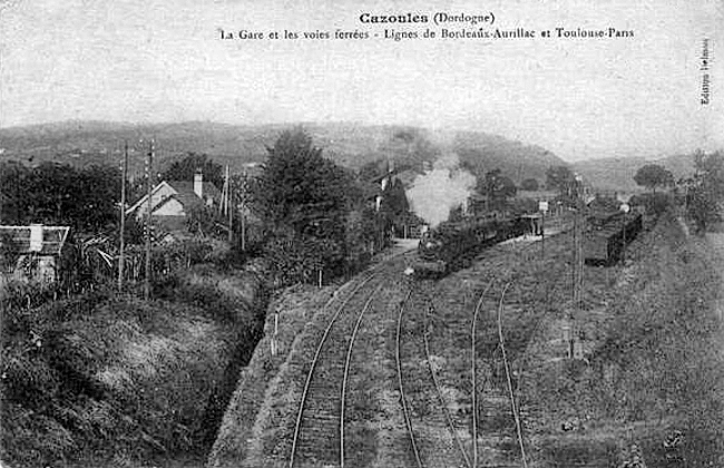 Intérieur de la gare de bifurcation avec les voies de la ligne de Bordeaux à Aurillac et de Toulouse à Paris.